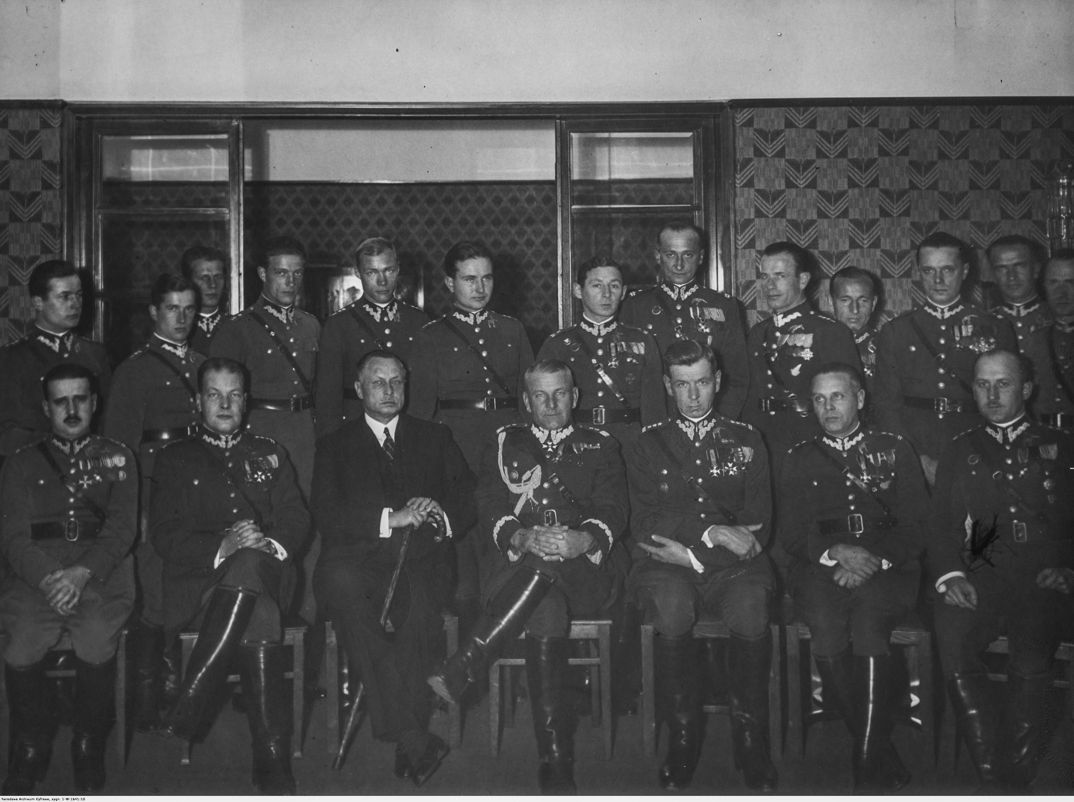 Centralne zawody lotnicze w Warszawie. Fotografia grupowa uczestników uroczystości wręczenia nagród w zawodach lotniczych. Siedzą od lewej: ppłk Tytus Karpiński, płk Janusz de Beaurain, prezes Rady Nadzorczej "Norblin" Stanisław Janicki, gen. Kazimierz Fabrycy, płk Ludomił Rayski, ppłk Franciszek Wieden. Koncern Ilustrowany Kurier Codzienny - Archiwum Ilustracji. Sygnatura: 1-W-1641-10